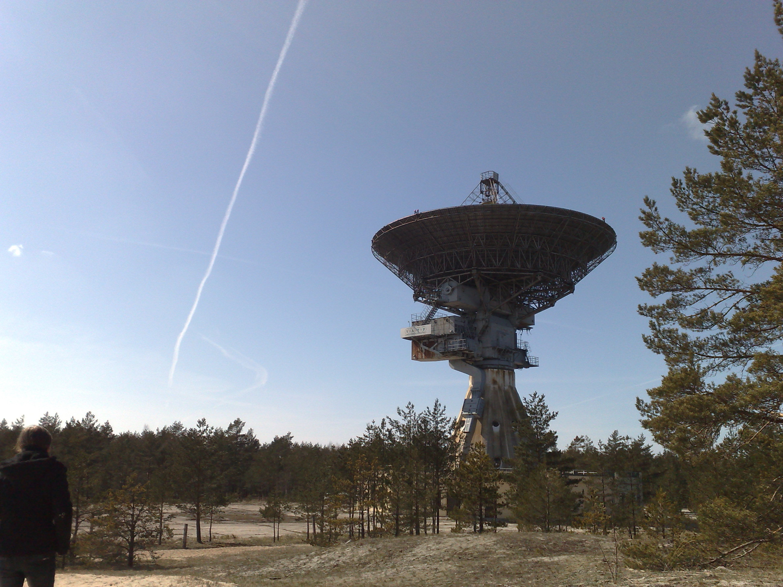 Радиотелескоп РТ-32 в Ирбене, Латвия.